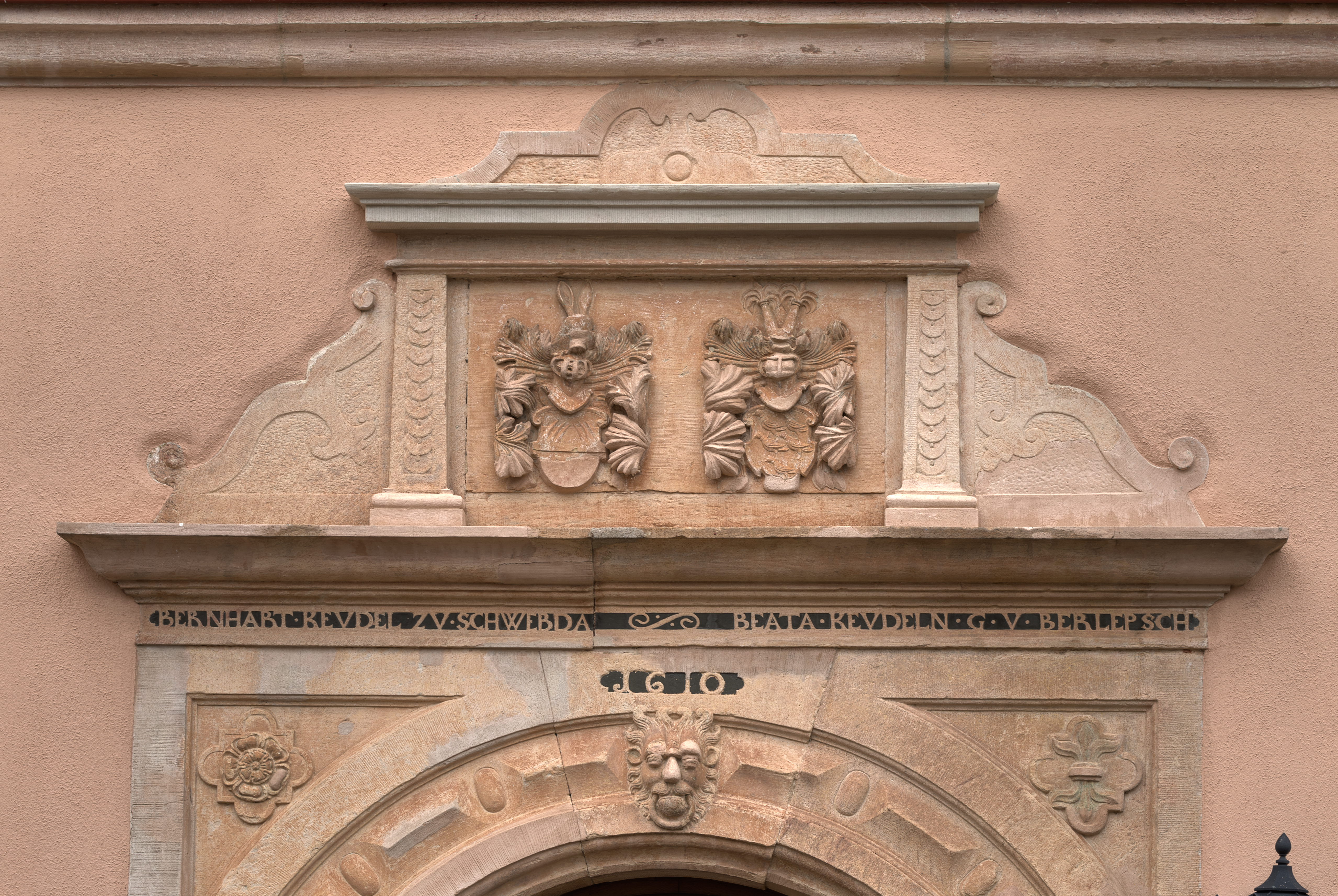 Oberer Teil des Rundbogenportals von Schloss Grebendorf. Reliefwappen von Bernhart Keudell zu Schwebda und Beata Keudelin g.v. Berlepsch mit Inschrift "BERNHART KEVDEL ZV SCHWEBDA - BEATA KEVDELN G V BERLEPSCH". Darunter die Jahreszahl "1610".